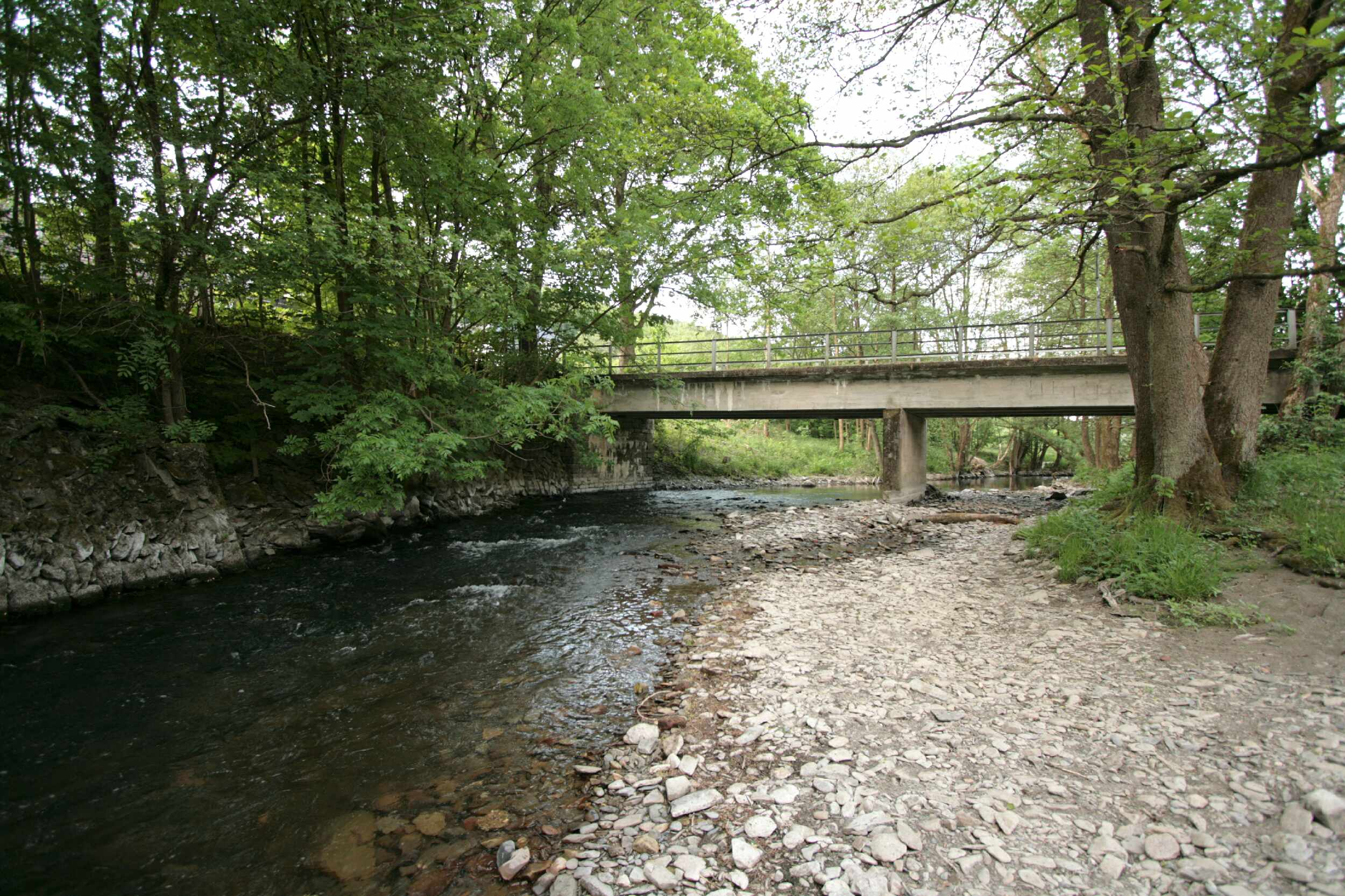 Brücke über die Lenne in Lennestadt-Gleierbrück Übergang des Kriegerweges über die Lenne eigenes Foto Aufnahmedatum: 24.05.2008 --Wolfgang Poguntke 07:35, 25 May 2008 (UTC)